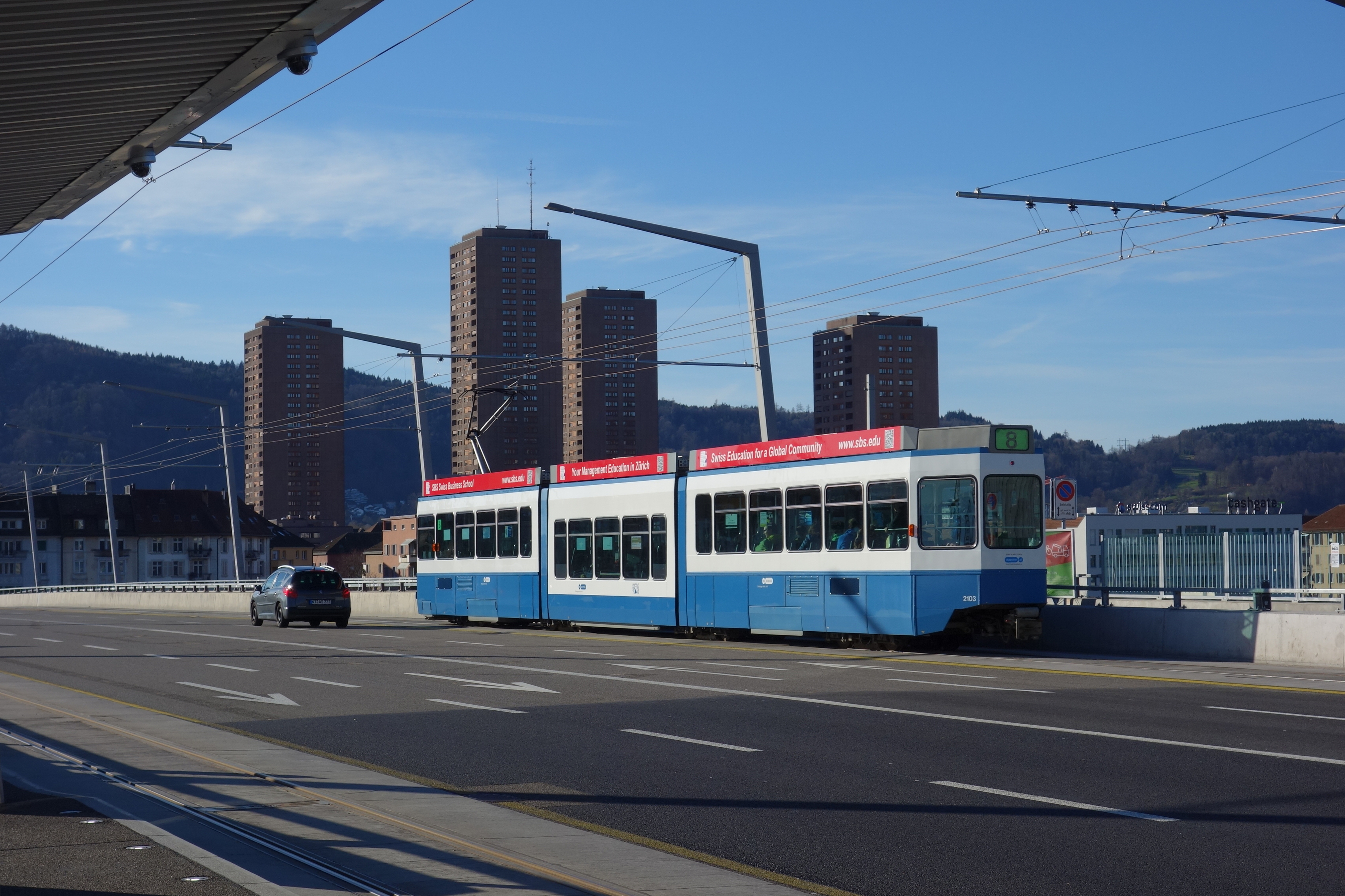 Tram 8, Hardbrücke, Zürich, Schweiz